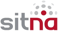 Logo de SITNA